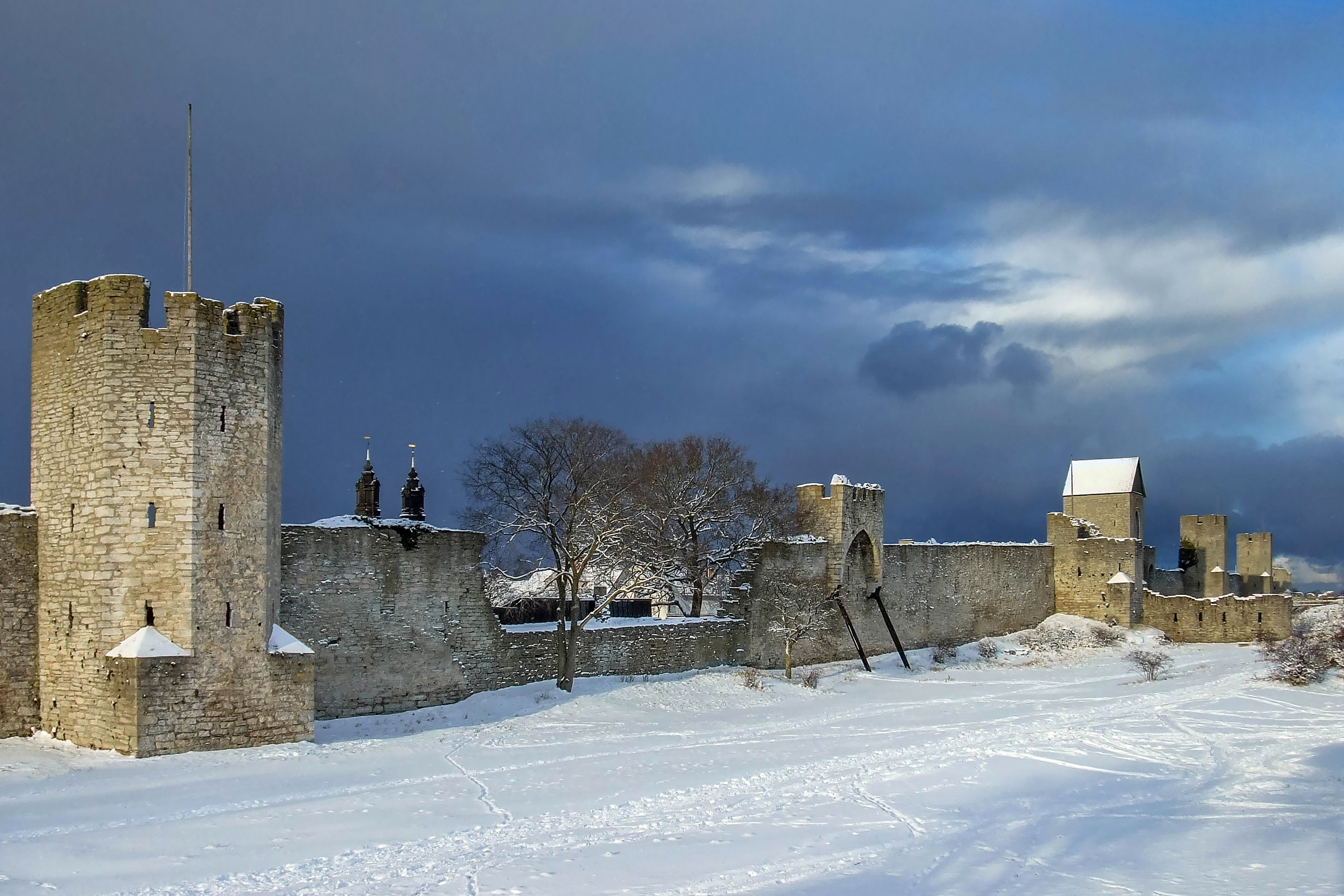 Östra delen av Visby ringmur mot norr och Sparbössan. De två tornen på Sankta Maria domkyrka syns bakom muren.